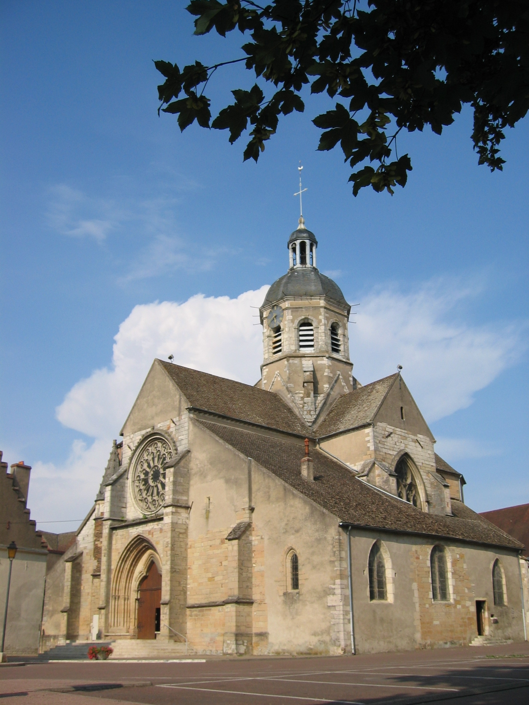 Seurre - l'église du XIV° siècle (Bourgogne - France - 21) self made PRA